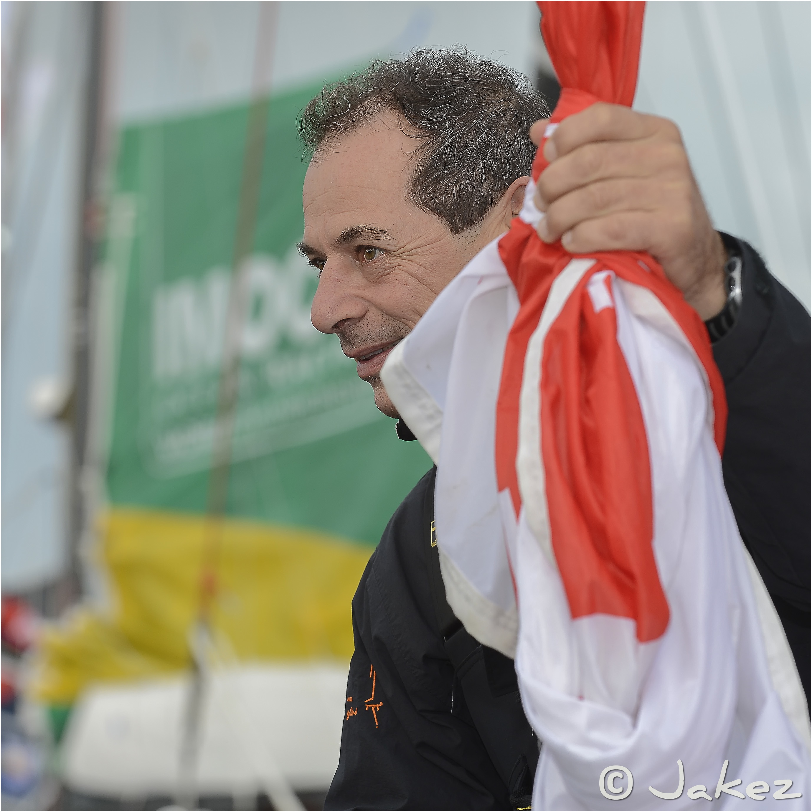 0181-Vendée 2012 (Ponton)